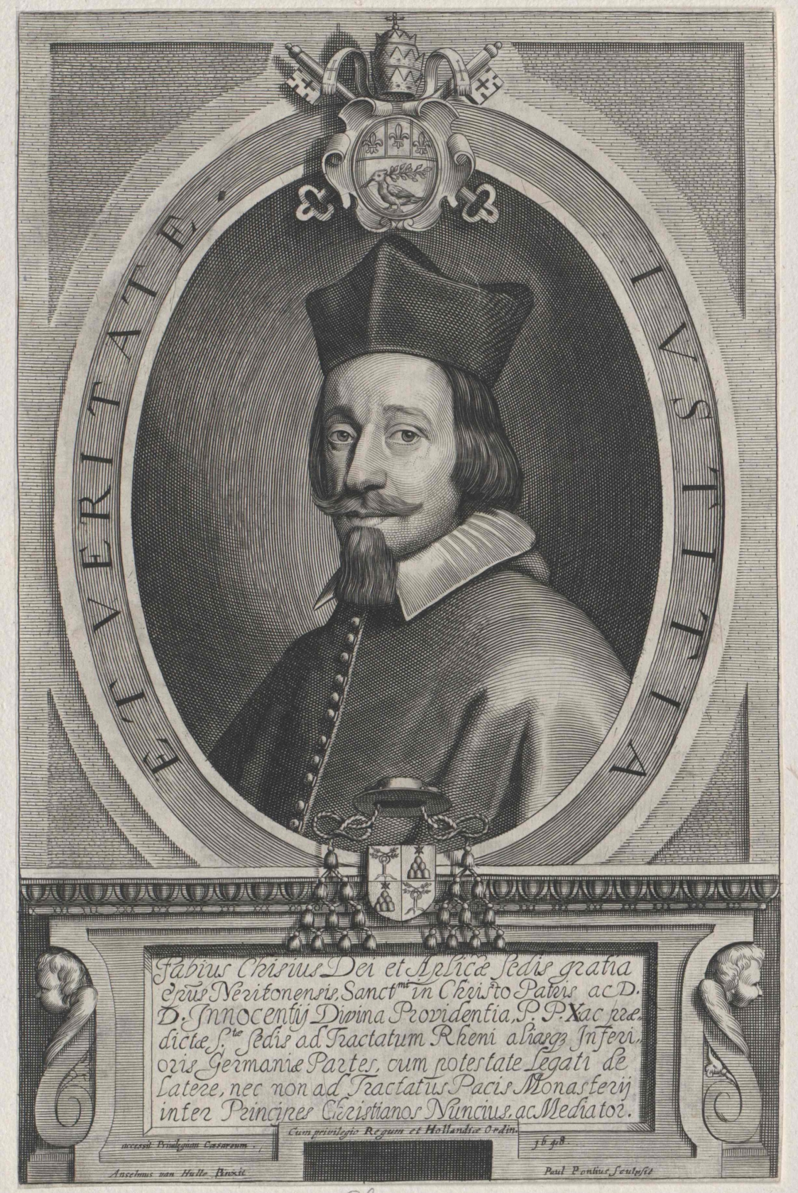 Alexander VII., papa